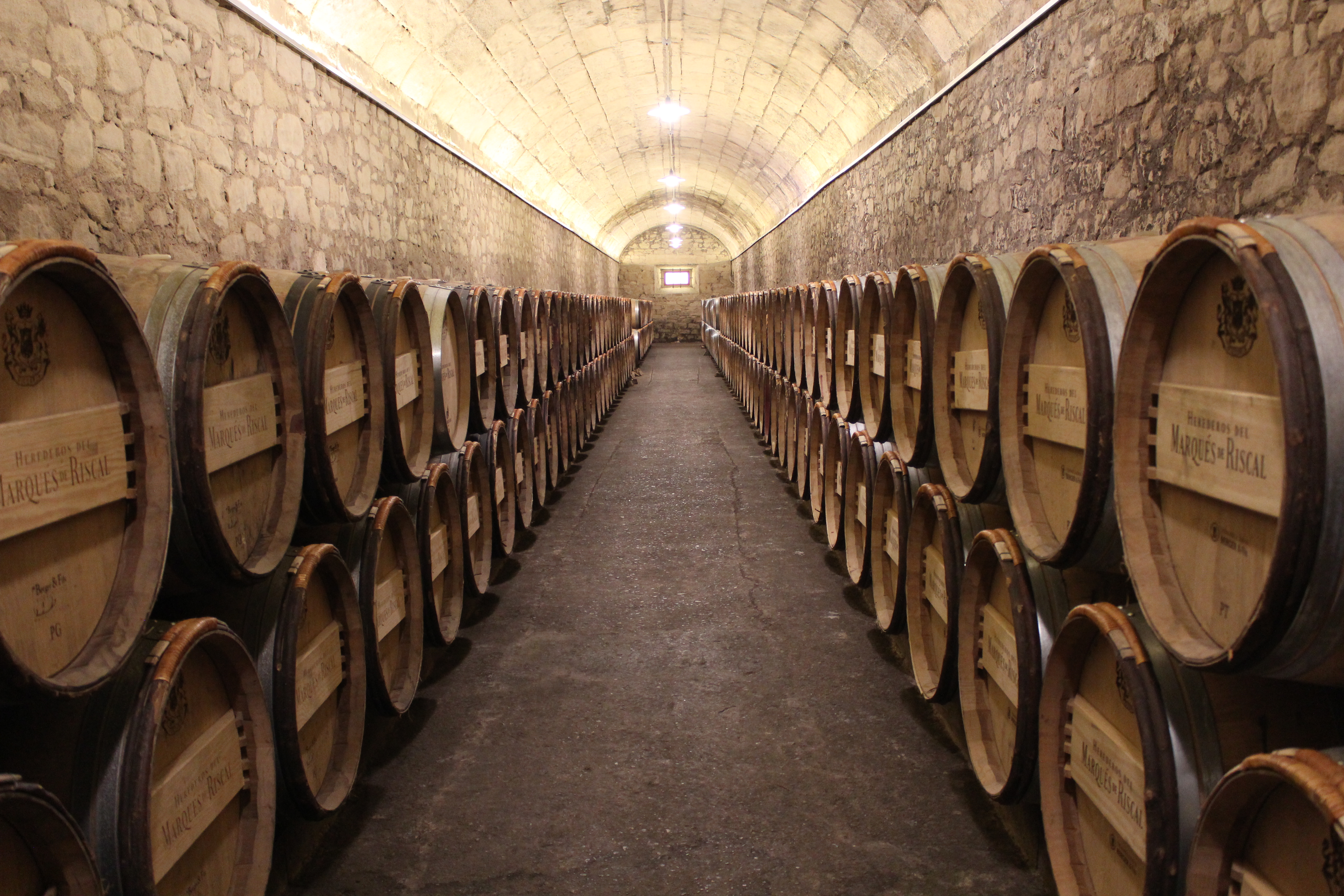 Elciego, Bodegas Marqués de Riscal: Innenraum eines Kellers mit Eichenfässern